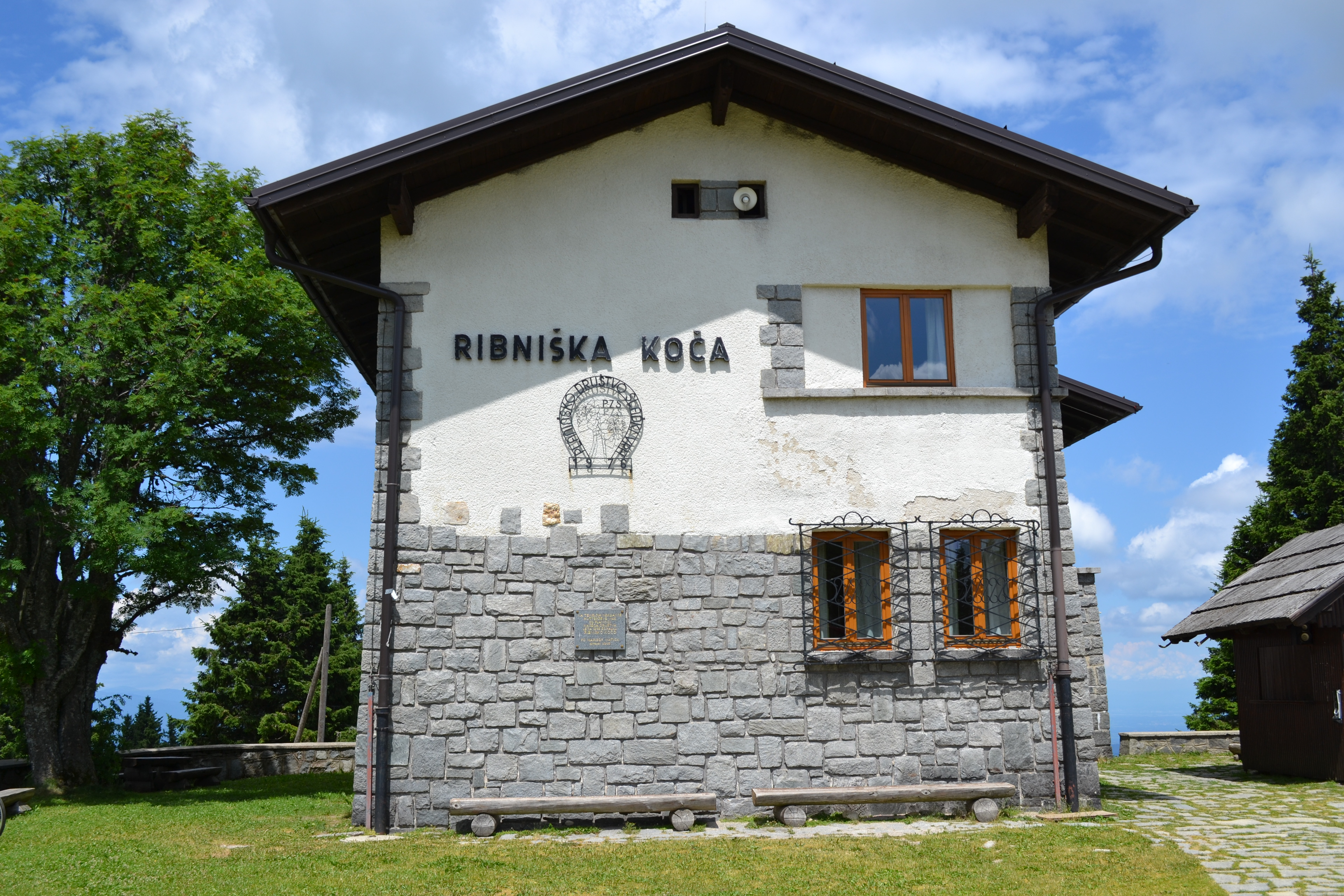 Ribniška koča